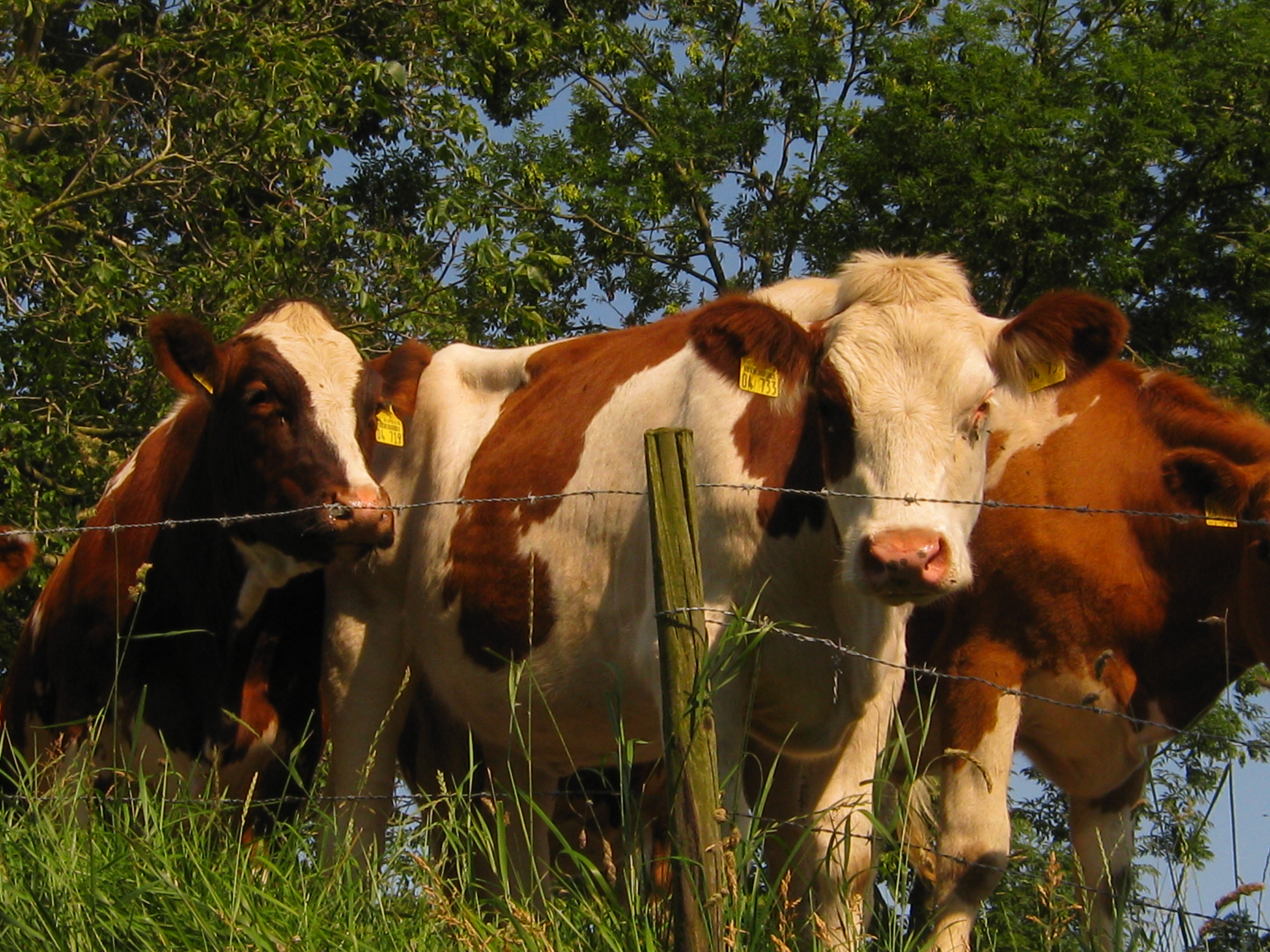 Fotografie von rotbunten Rindern auf dem Winterdeich in der Seestermüher Marsch (Schleswig-Holstein)